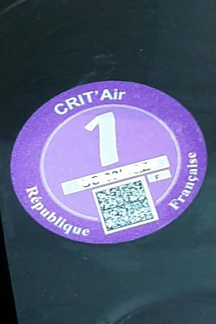 Vignette Crit'Air catégorie 1